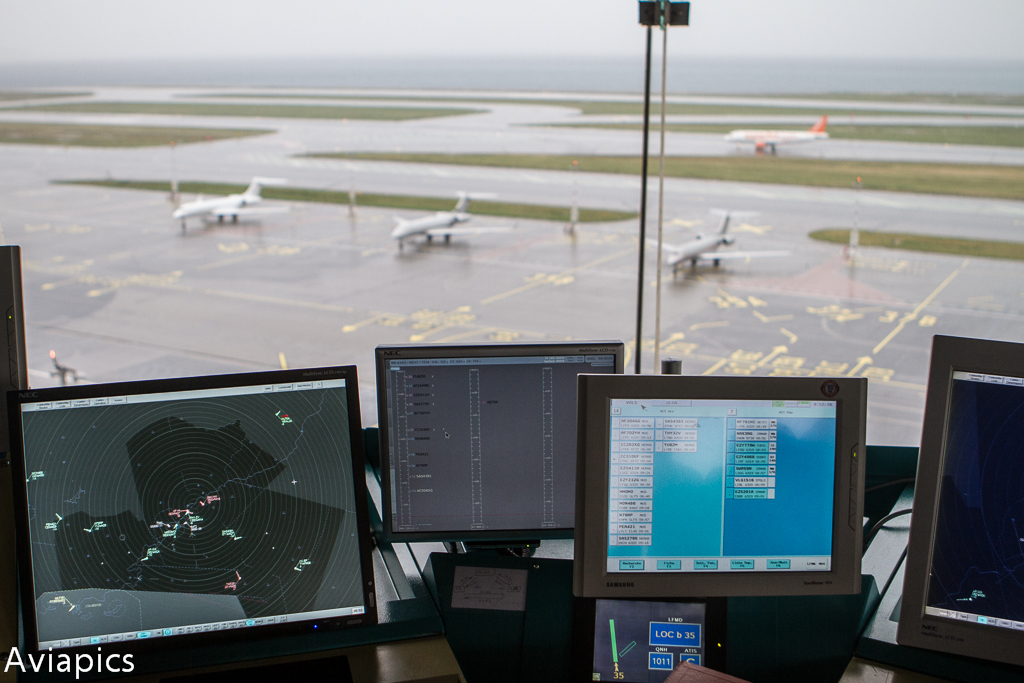 Vue d'une Vigie (contrôle d'aérodrome)